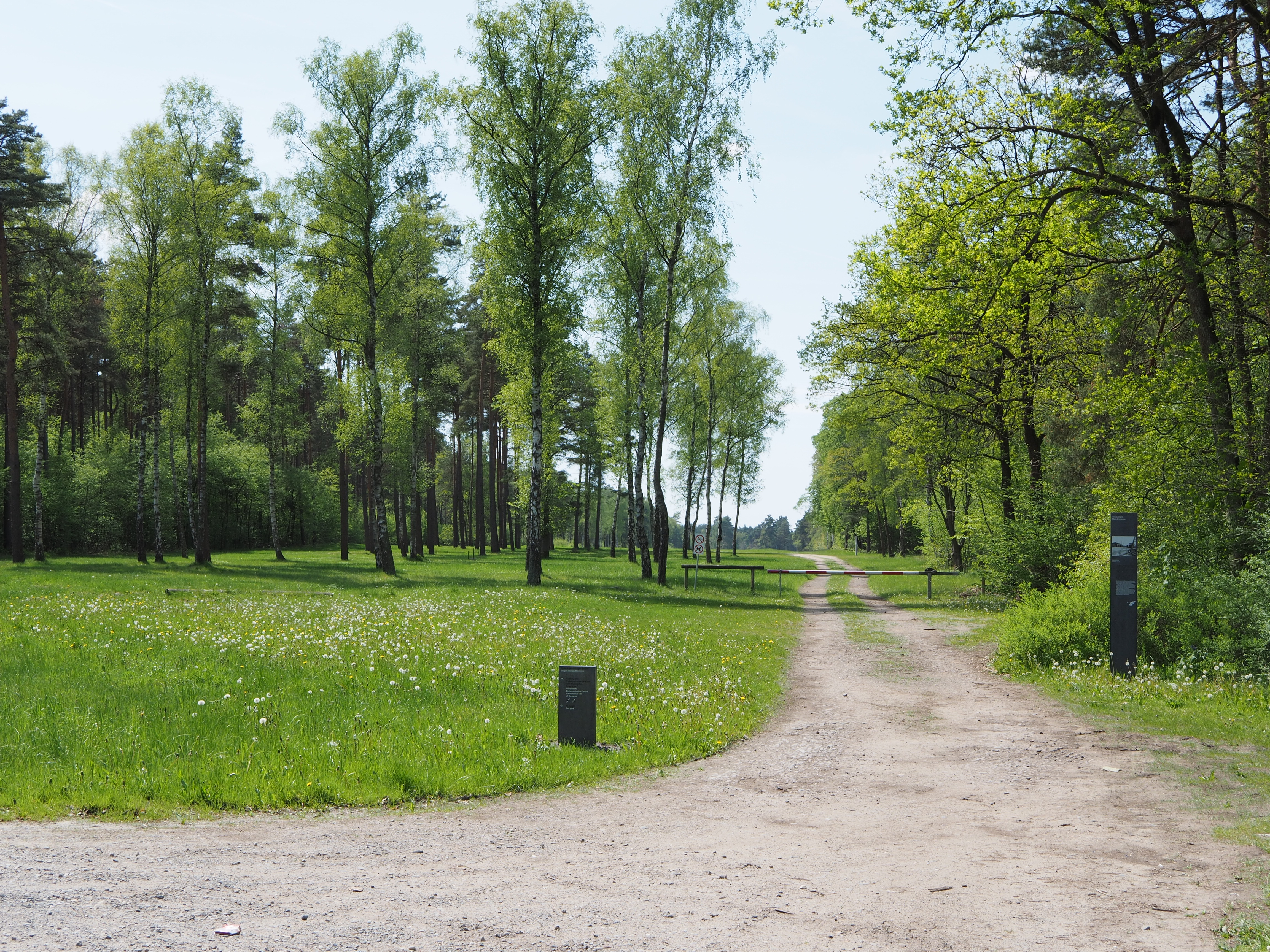 Ehemaliger Lagerhaupteingang KZ Bergen-Belsen 2017